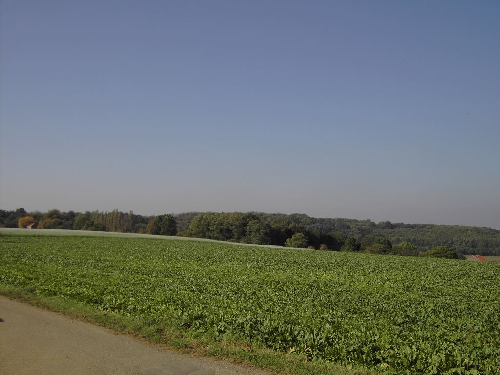 Linden - zicht op het Chartreuzebos vanop de Speelberg